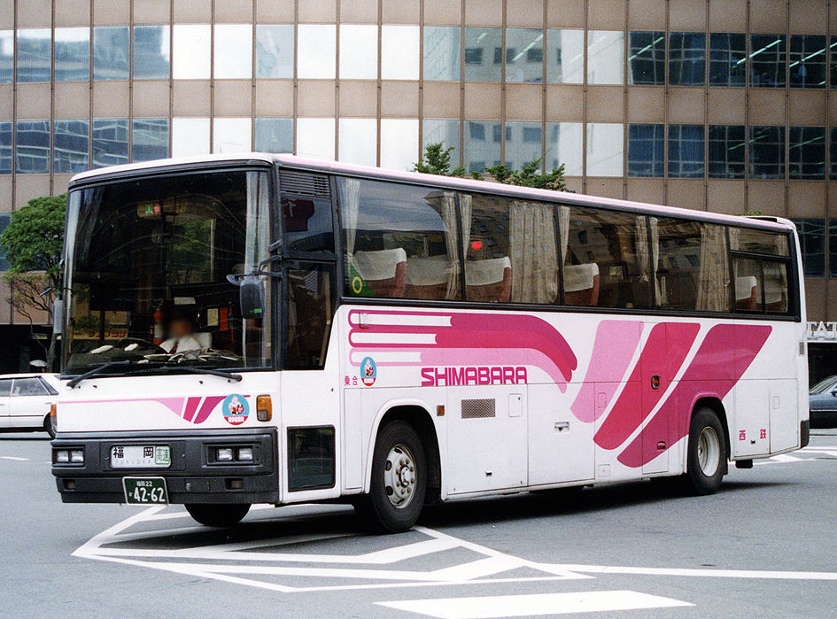 西日本鉄道 高速バス 島原号 三菱ふそう P-MS725S 西工SD-I 4455